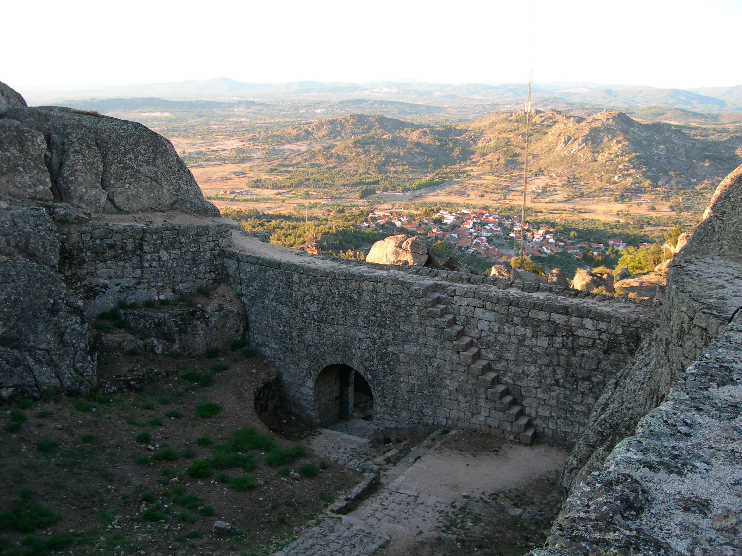 Castelo e muralhas de Monsanto III This monument is classified as Monumento Nacional. This file was uploaded for Wiki Loves Monuments in Portugal with the unique identifier 69865.